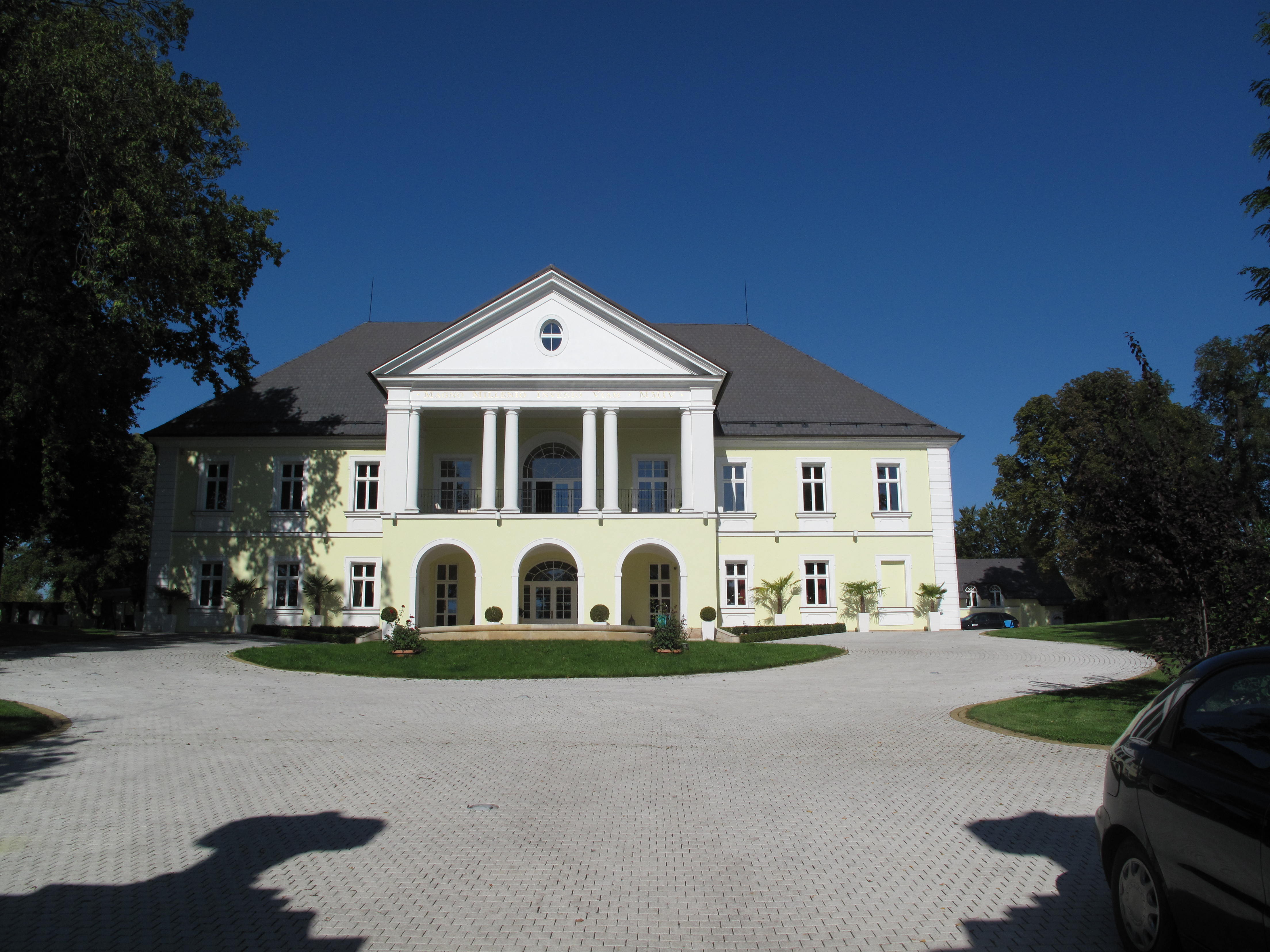 Klecany